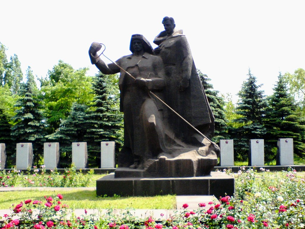 Пам’ятник радянським воїнам-металургам, Алчевськ, пл. К. Маркса